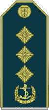 Serbian military ranks and insignia